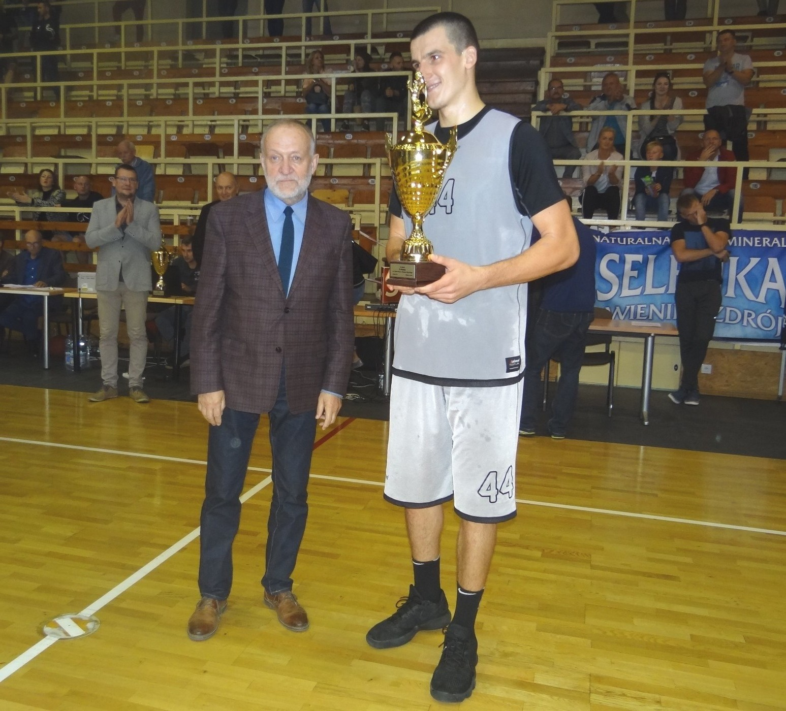 Hubert Pabian (23.09.2018)